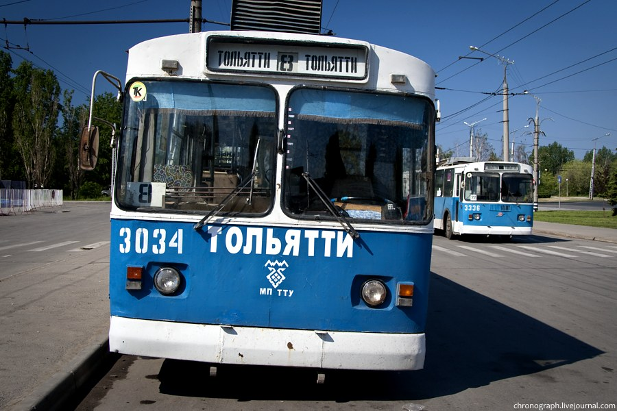 Конечная остановка тролейбусов "Речной порт", Тольятти, Россия